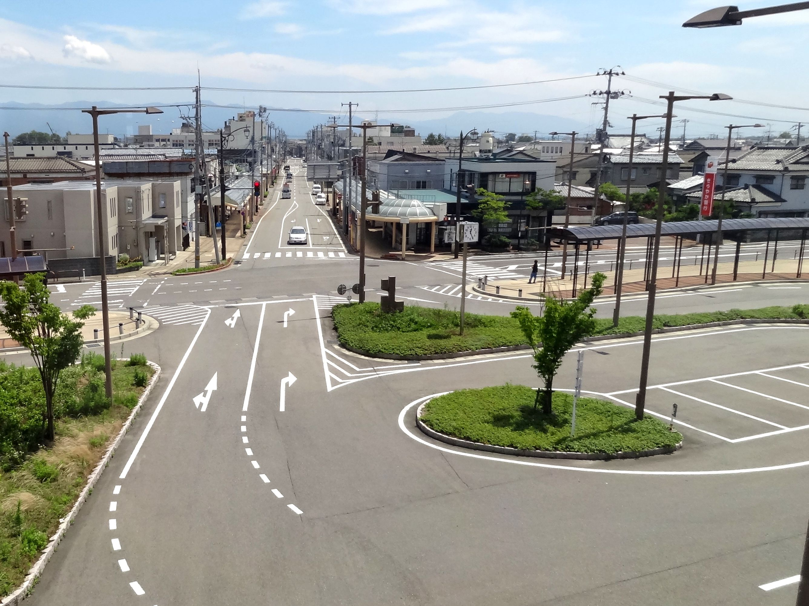 豊栄駅前（南口）